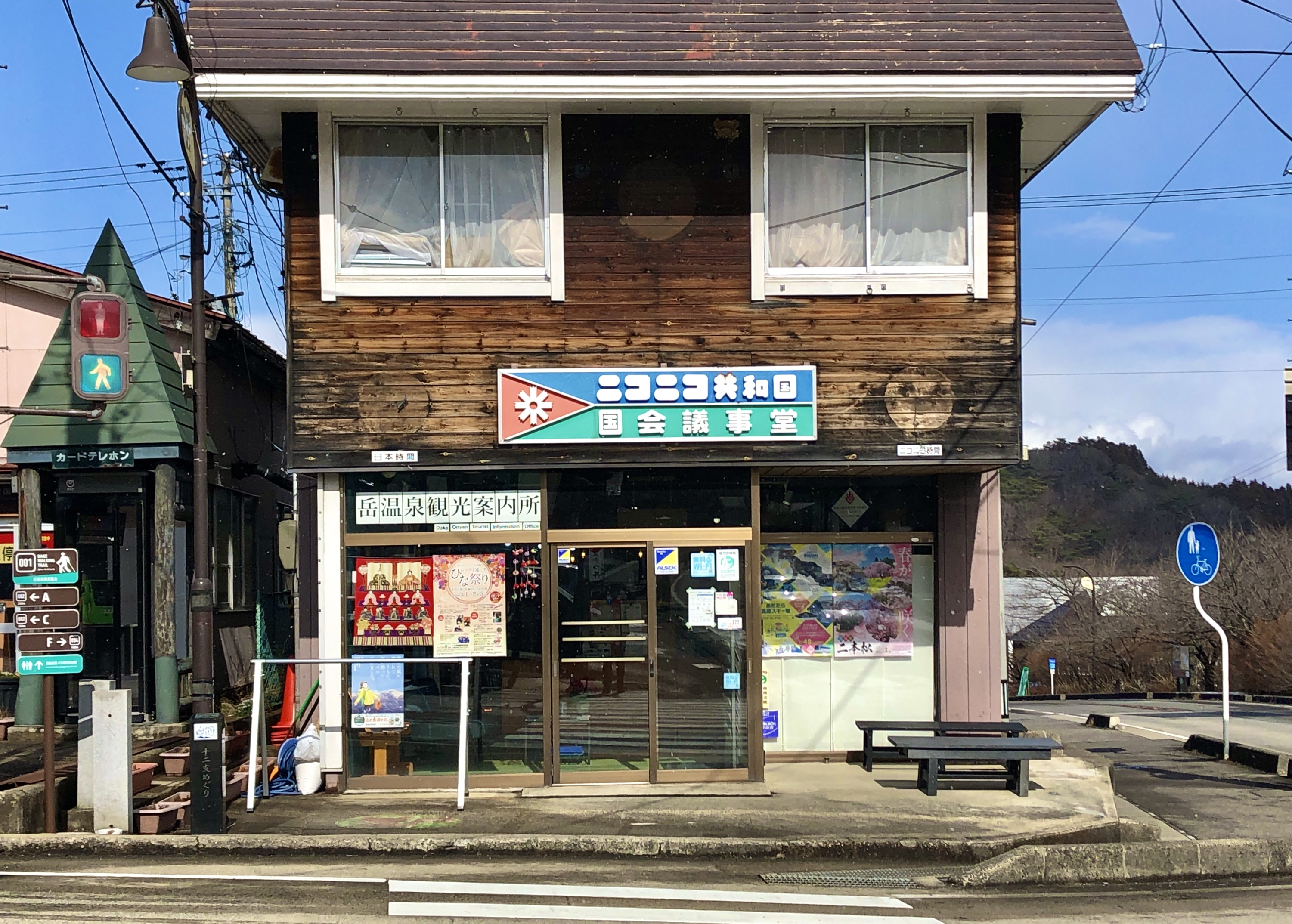 ニコニコ共和国に関する写真